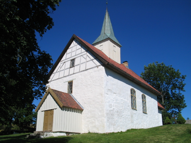 Skoger gamle kirke